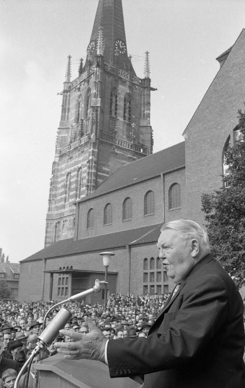 9.65 Wahlreise - Bundeskanzler Ludwig Erhard